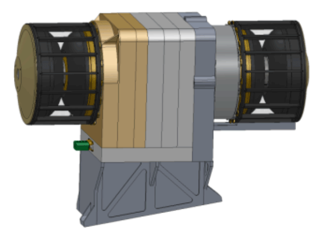 Parker Solar Probe Diagram instrument SWEAP-SPAN-A+